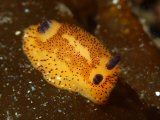 Jorunna parva, a 6 m, Osezaki, Japón